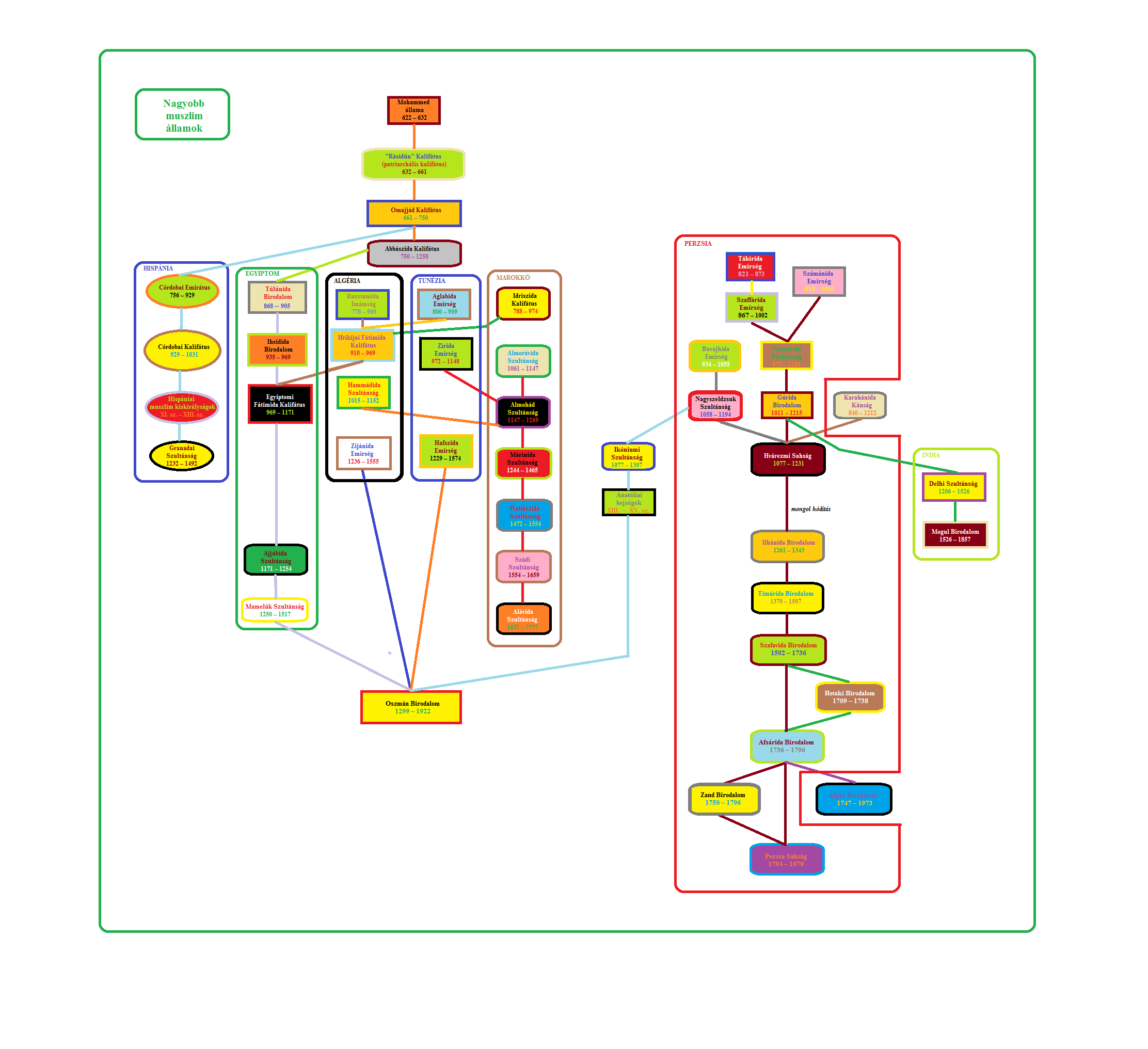 Arab államokat tartalmazza.